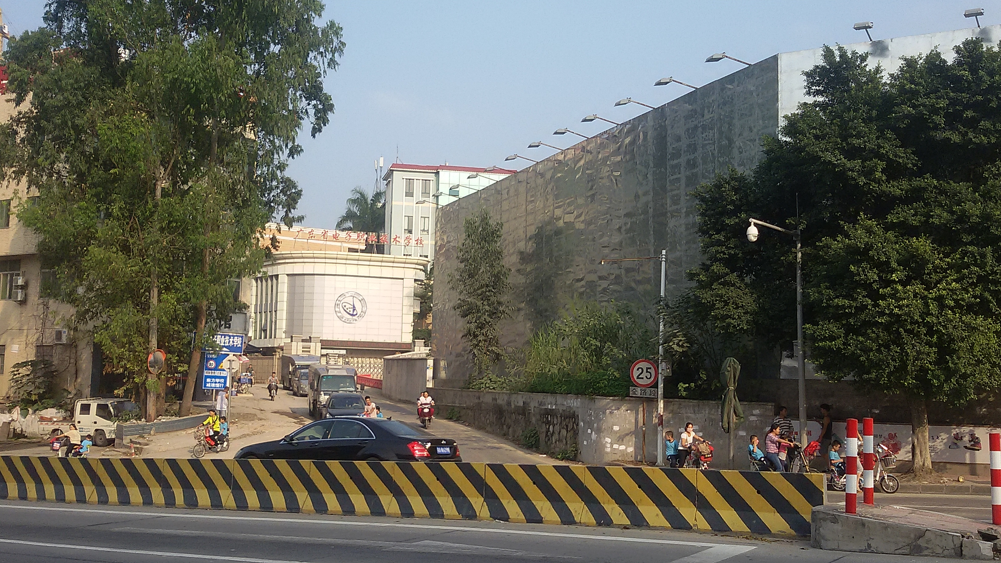 粵語: 廣東省電子職業技術學校大門